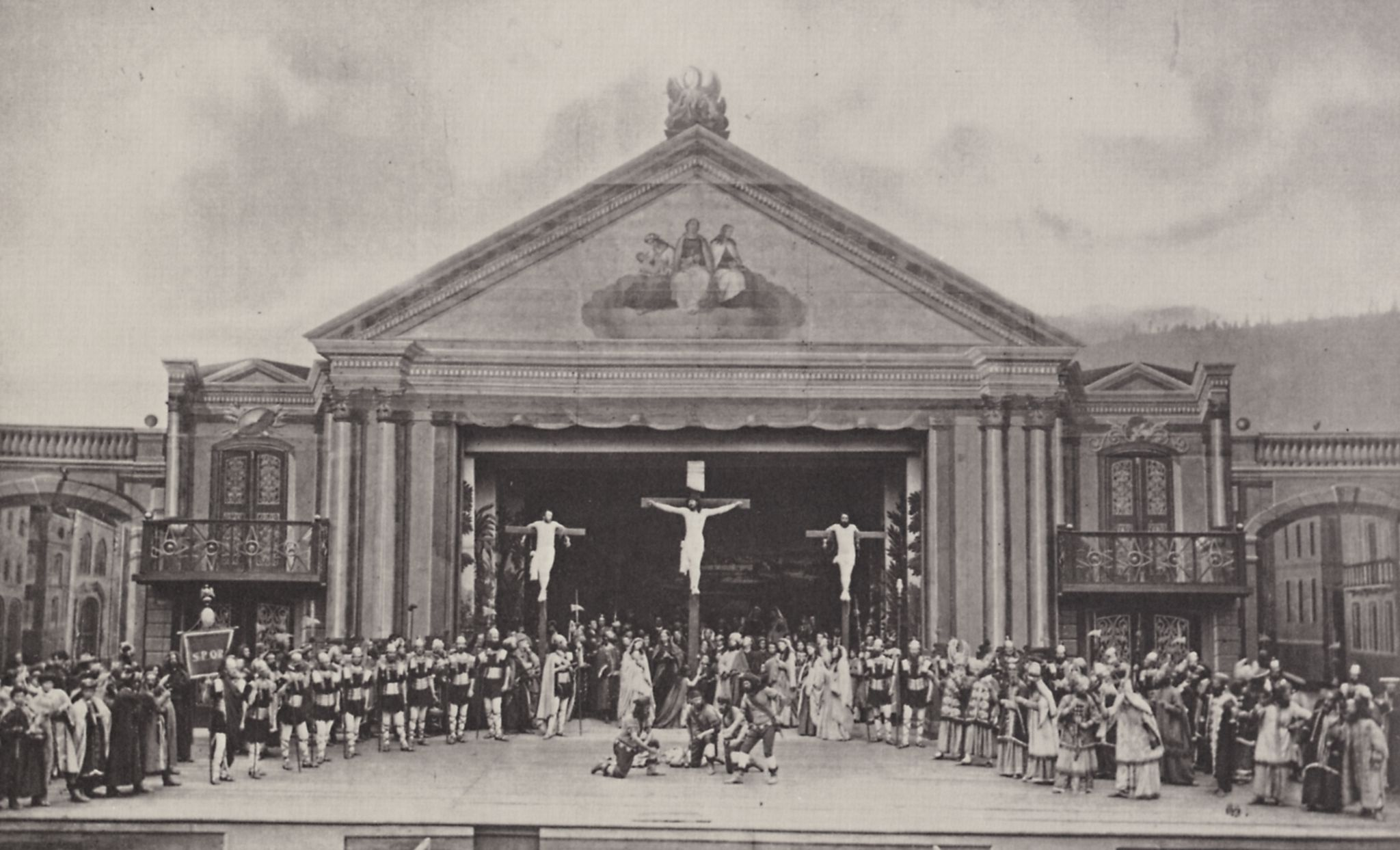 Oberammergauer Passionsspiel, Kreuzigung, 1871. Fotografie, 148 x 237 mm